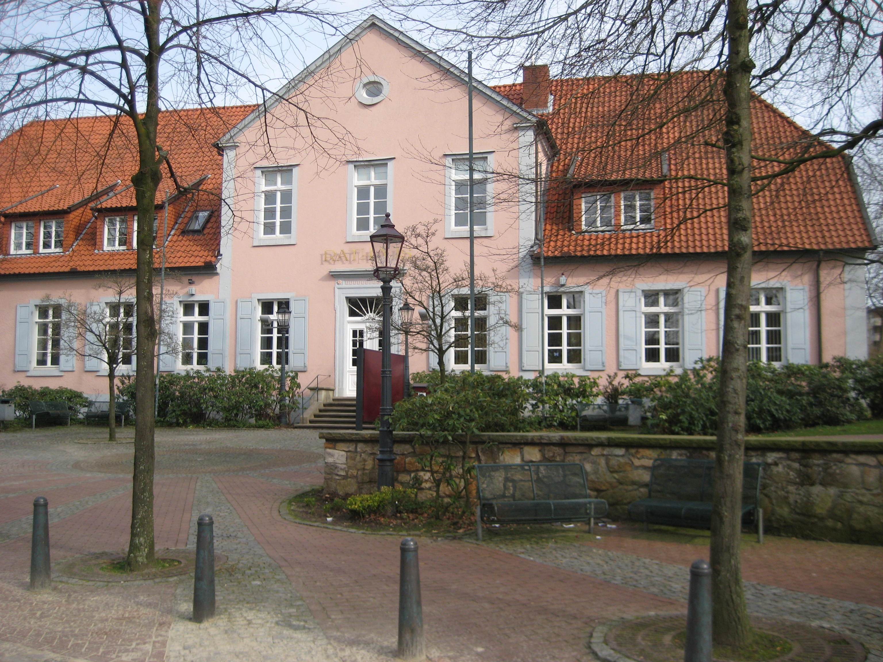 ehemaliger Gografenhof von Bad Iburg, seit 1967 Rathaus der Stadt